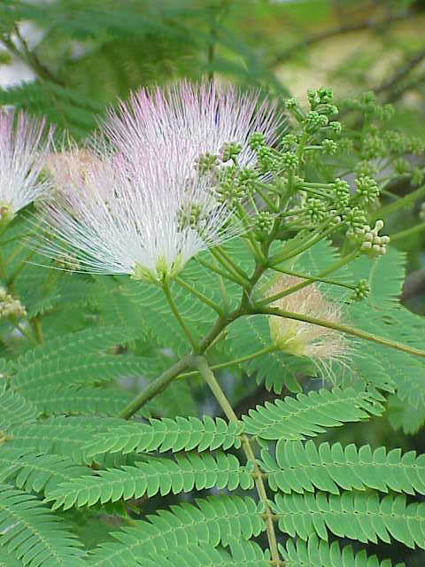 Species: Albizia julibrissin Family: Mimosaceae Image No. 5